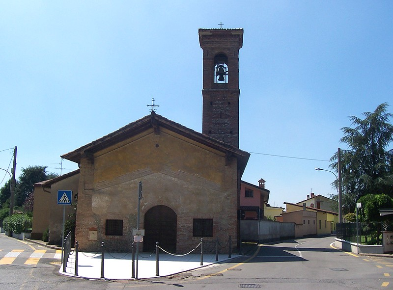 Urgnano - Chiesa della Ss. Trinità